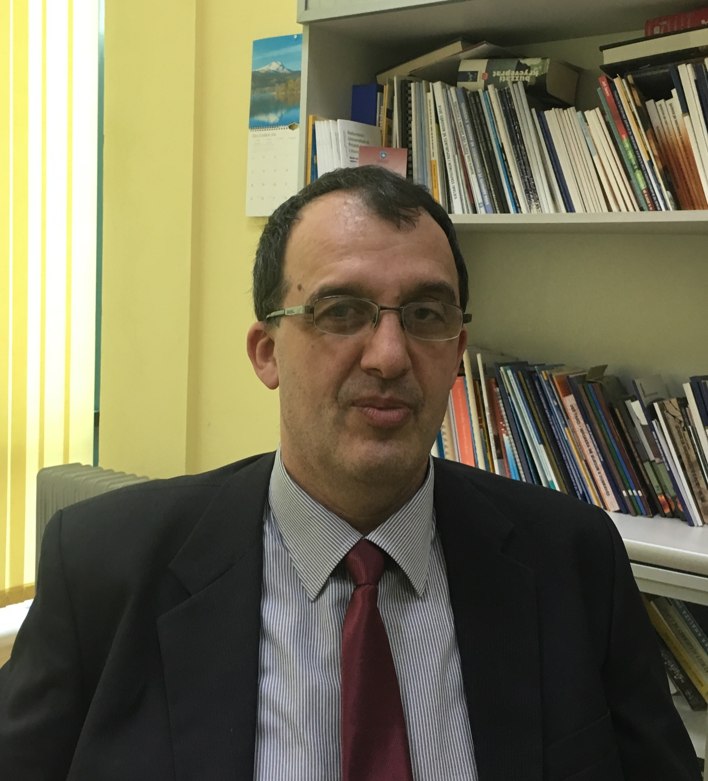 Dr.Dukagjin Pupovci, profesor universitar.